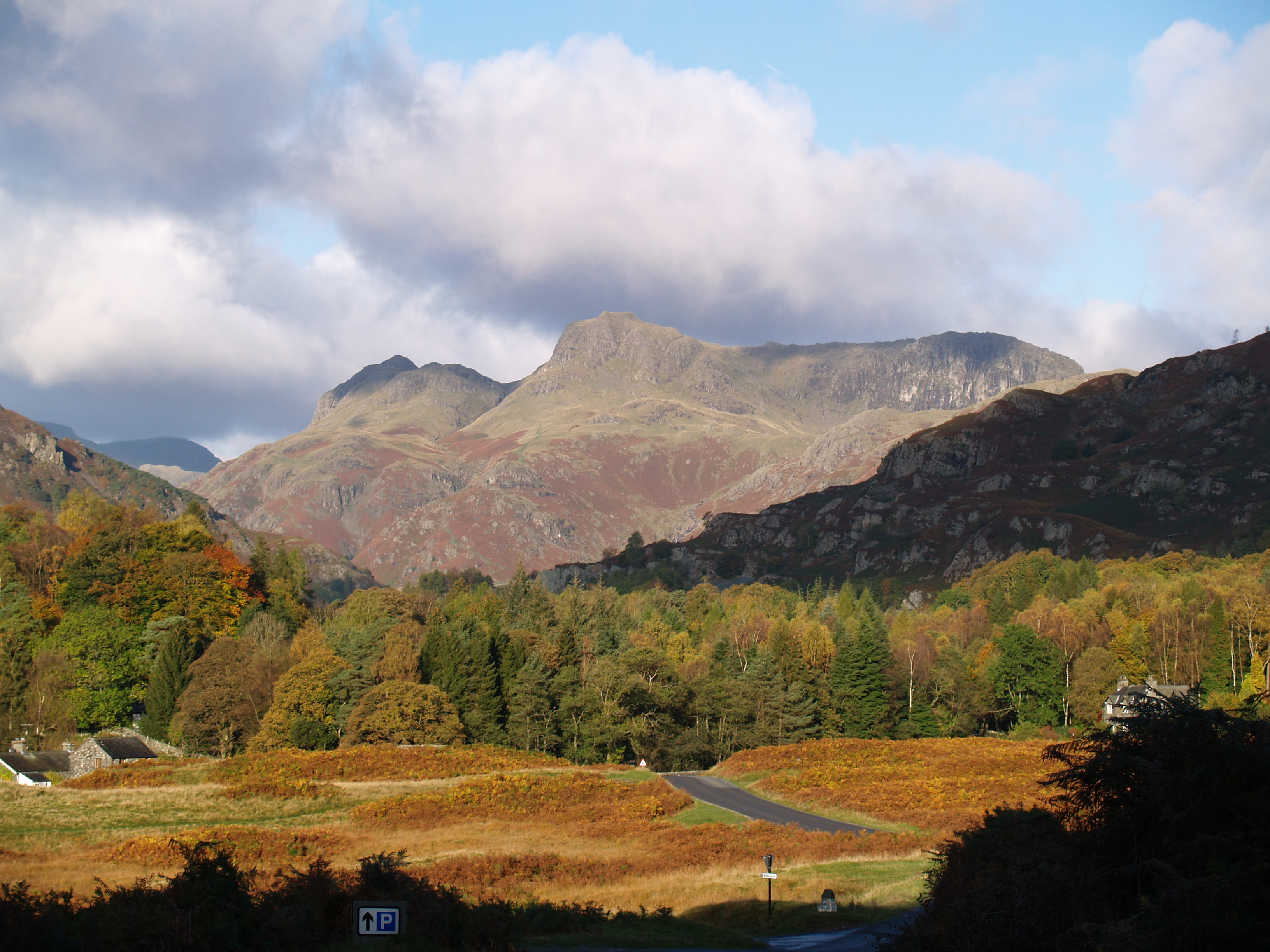 Langdale Pikes